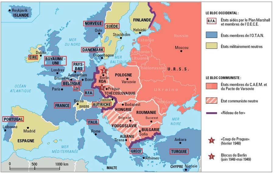 Carte du bloc occidental et du bloc communiste pendant la guerre froide